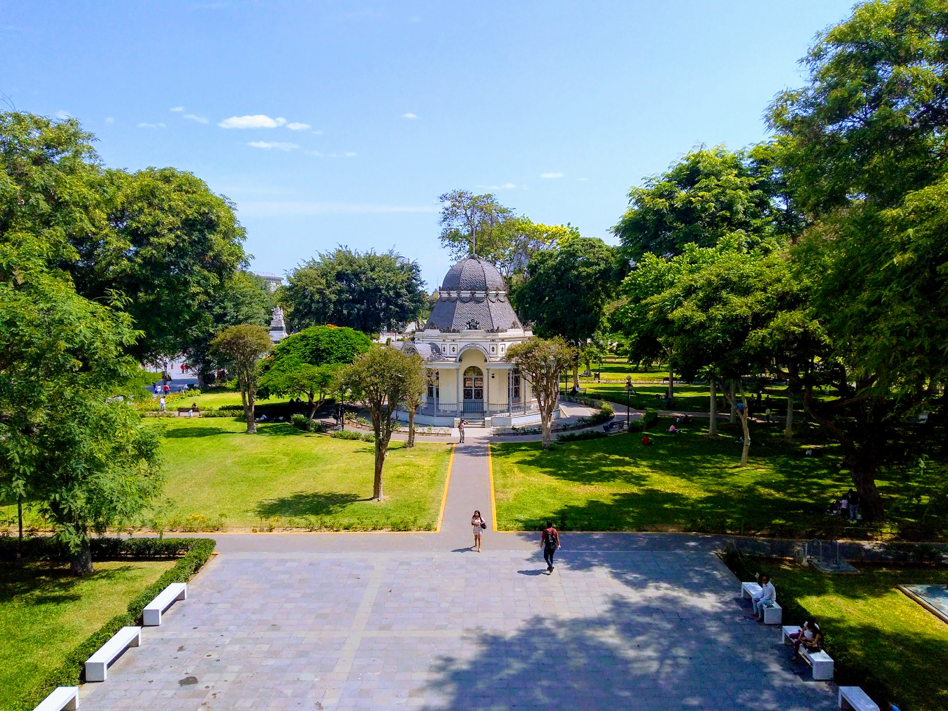 Vista del Paque de la Exposición desde el segundo piso del Museo de Arte de Lima